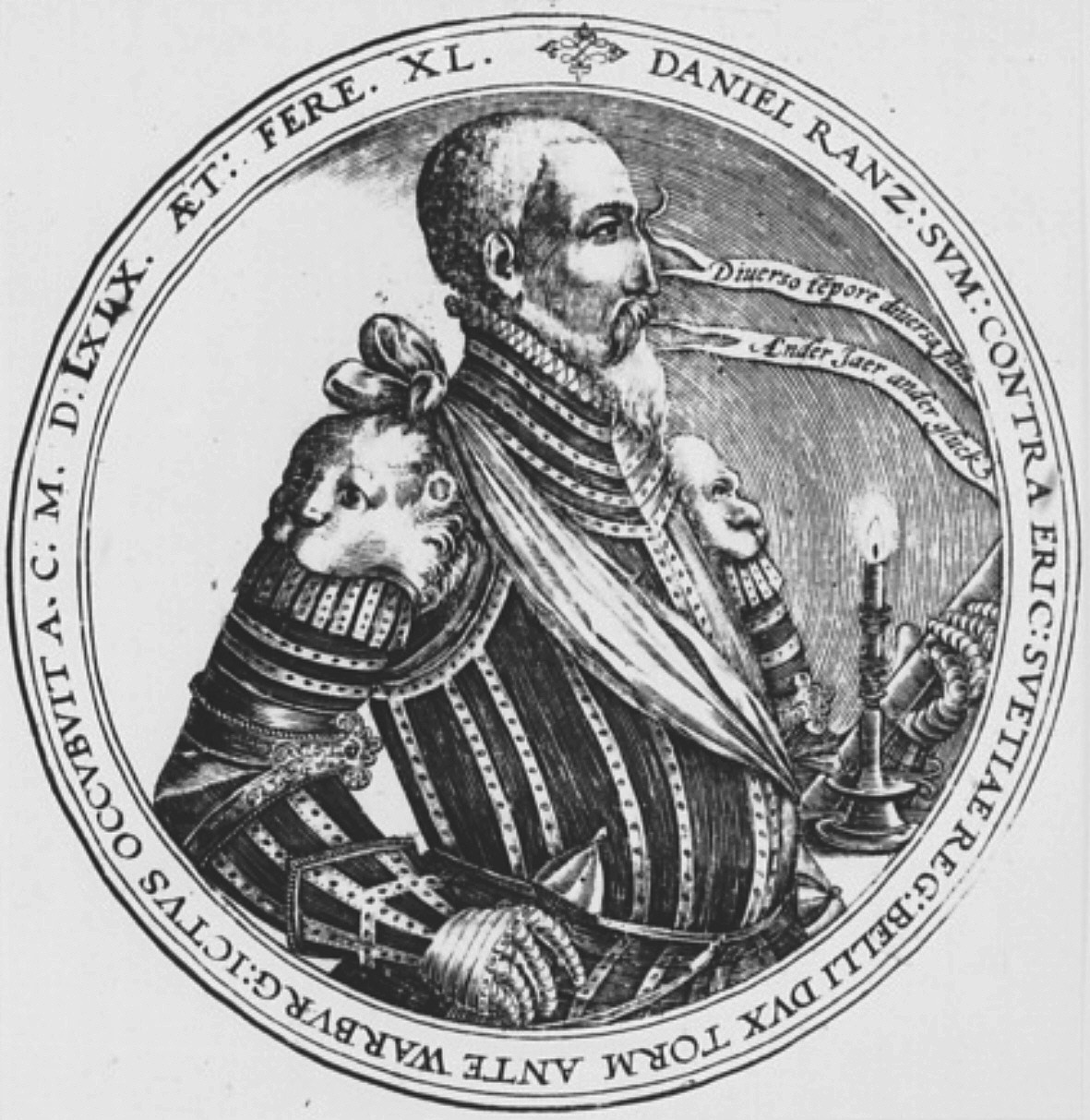 Daniel Rantzau (* 1529; † 11. November 1569 vor Warberg), königlich-dänischer Feldhauptmann. Porträt aus aus Hieronymus Henninges' Genealogiae aliquot famliarum nobilium Saxoniae, Hamburg 1590